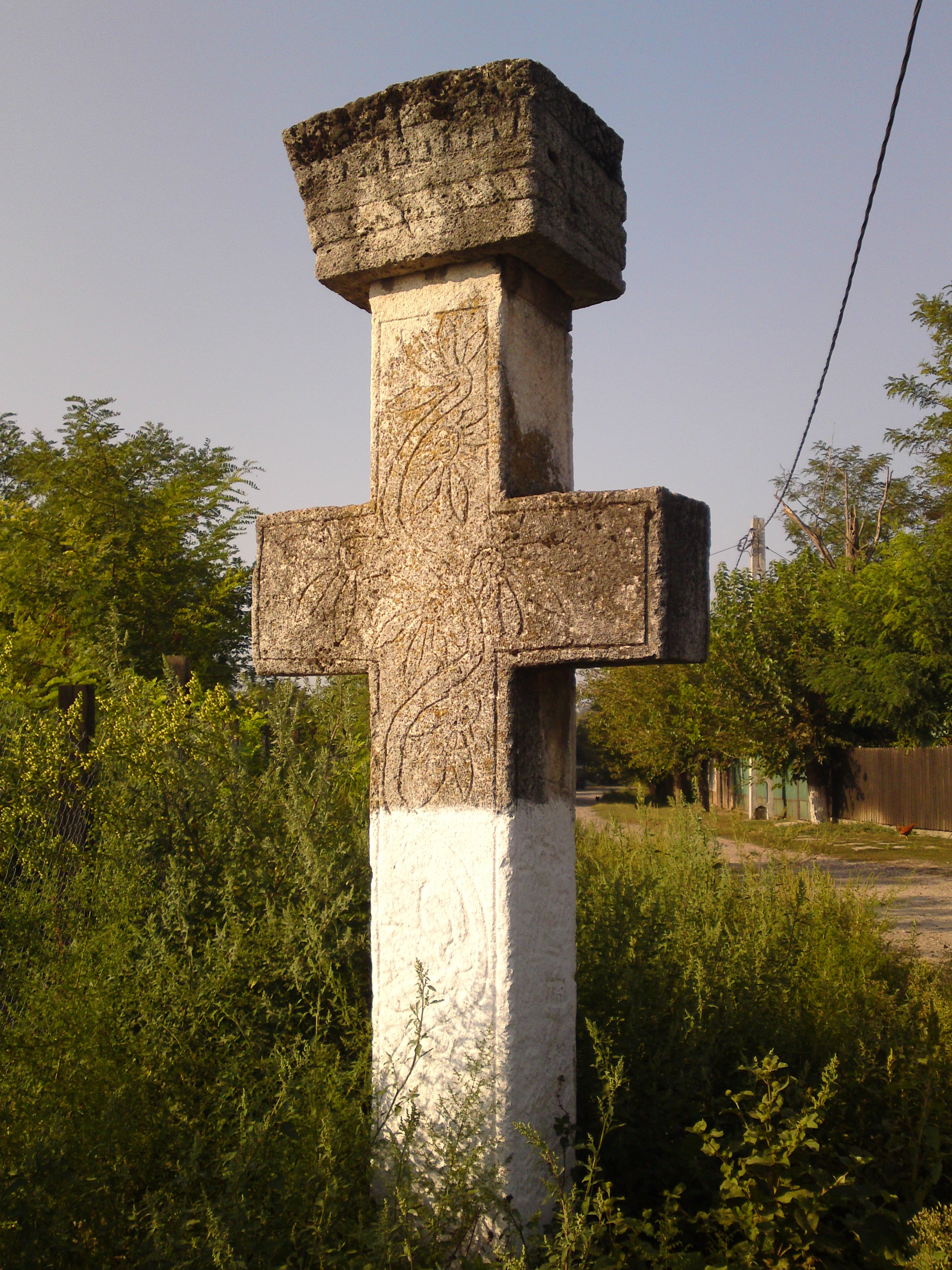 Cruce de hotar